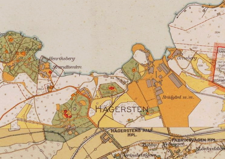 Hägerstens gård omkring 1920 (del av 1934 års karta över Stockholm med omgivningar)